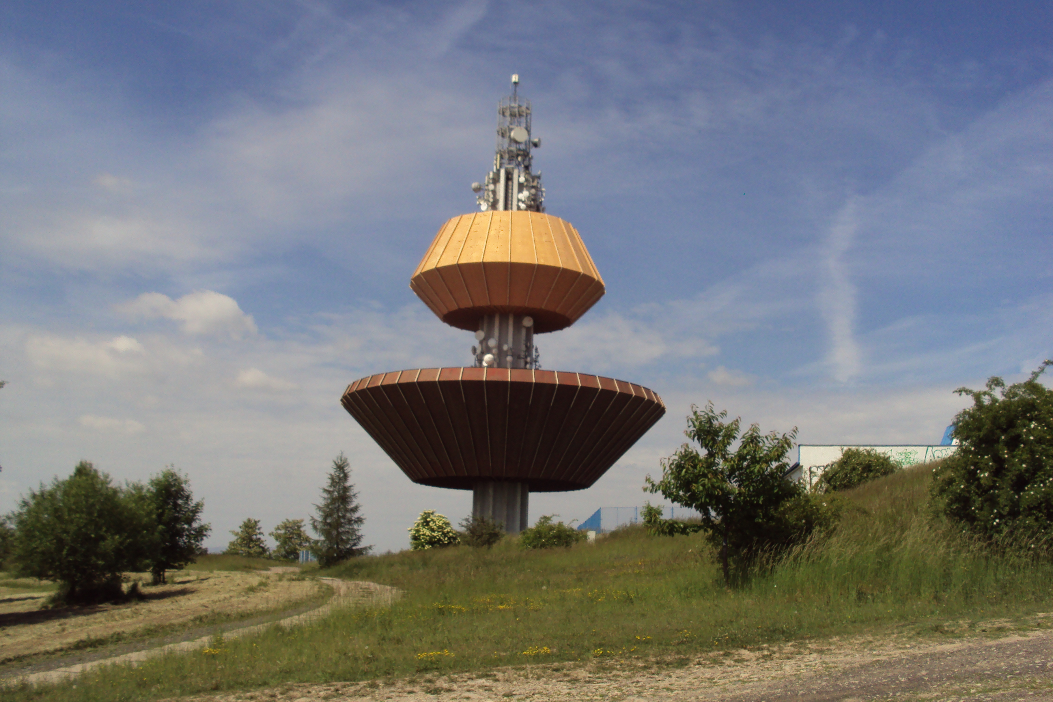 Vodárna nad Teplicemi, vrch Ve Chvojkách 383 m směrem k Nové vsi